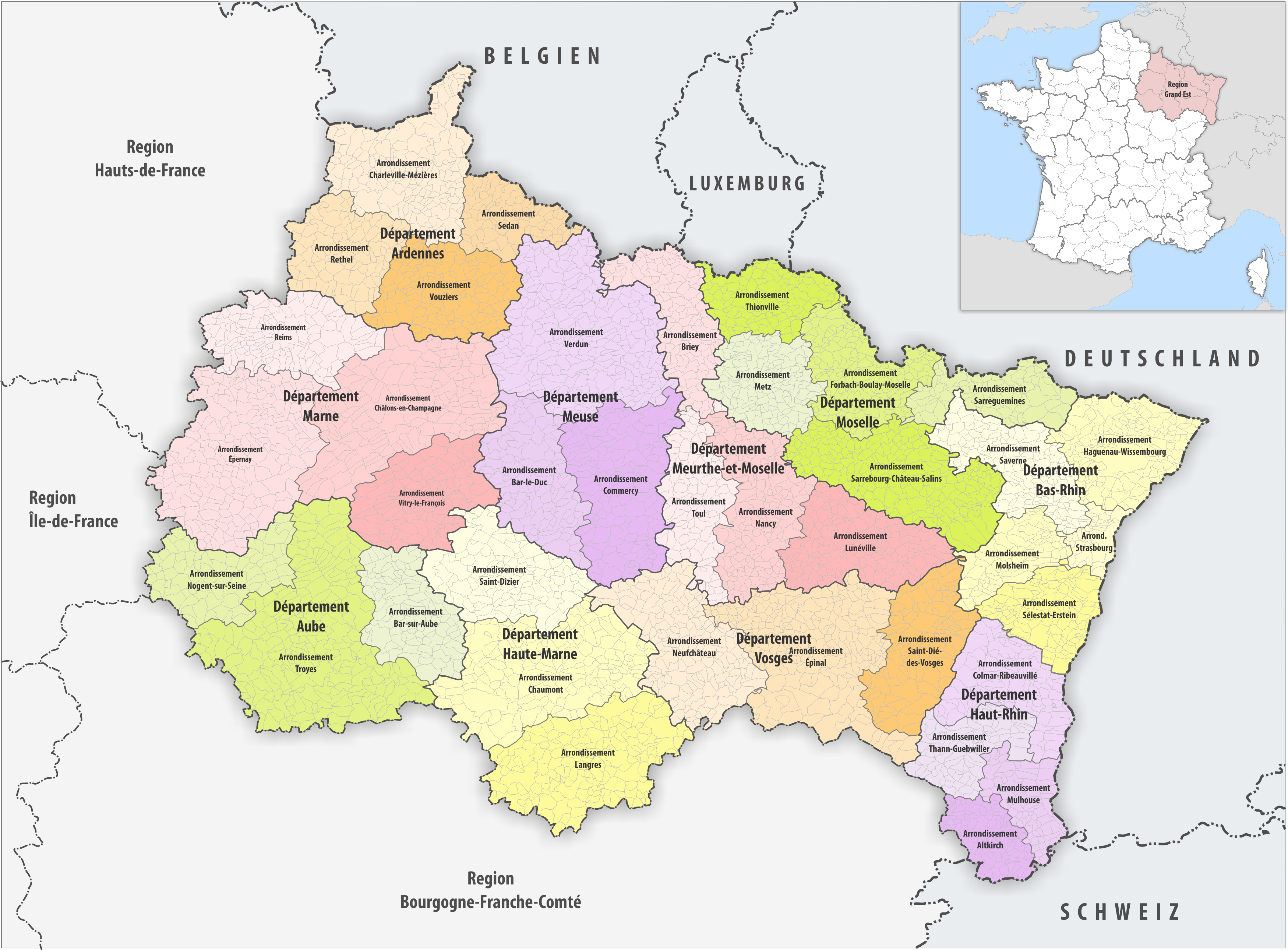 Gemeinden, Arrondissemente und Departemente in der Region Grand Est